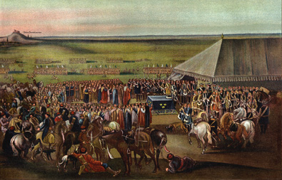 Polska trupper svär Karl X Gustav trohetsed vid Sandomierz den 3 november 1655.